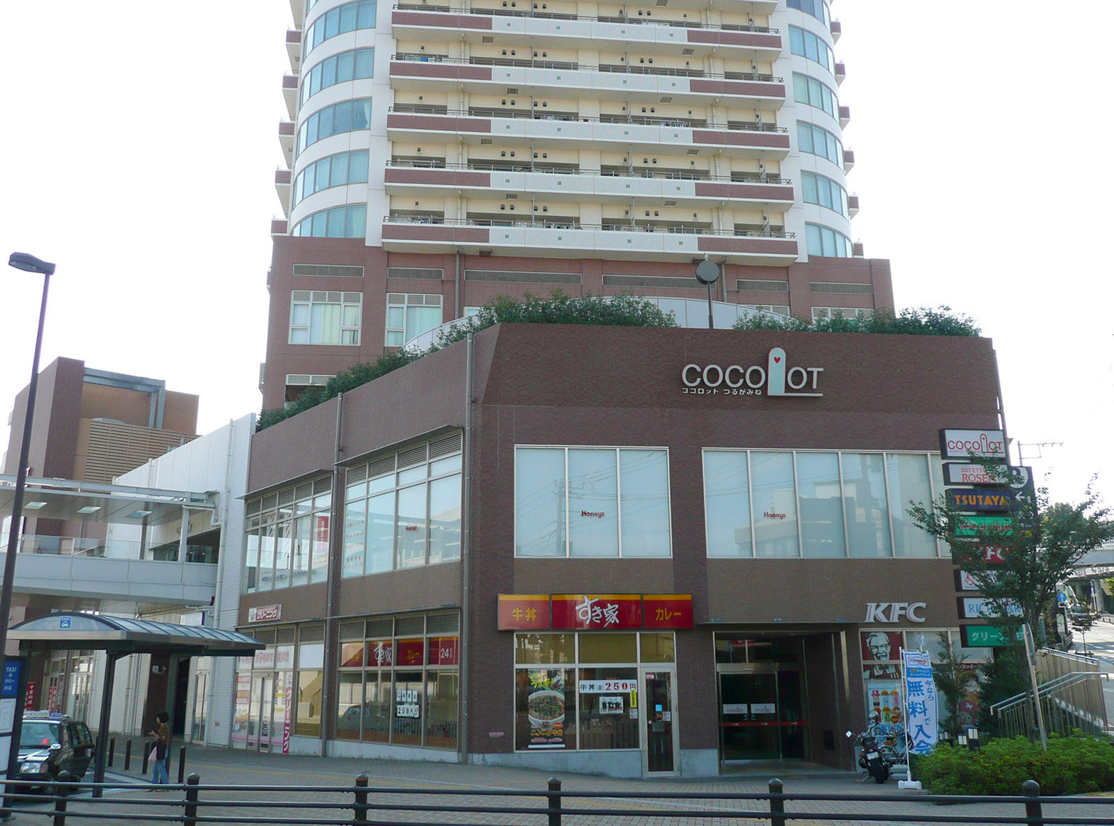 鶴ヶ峰駅南口にある「ココロット鶴ヶ峰」